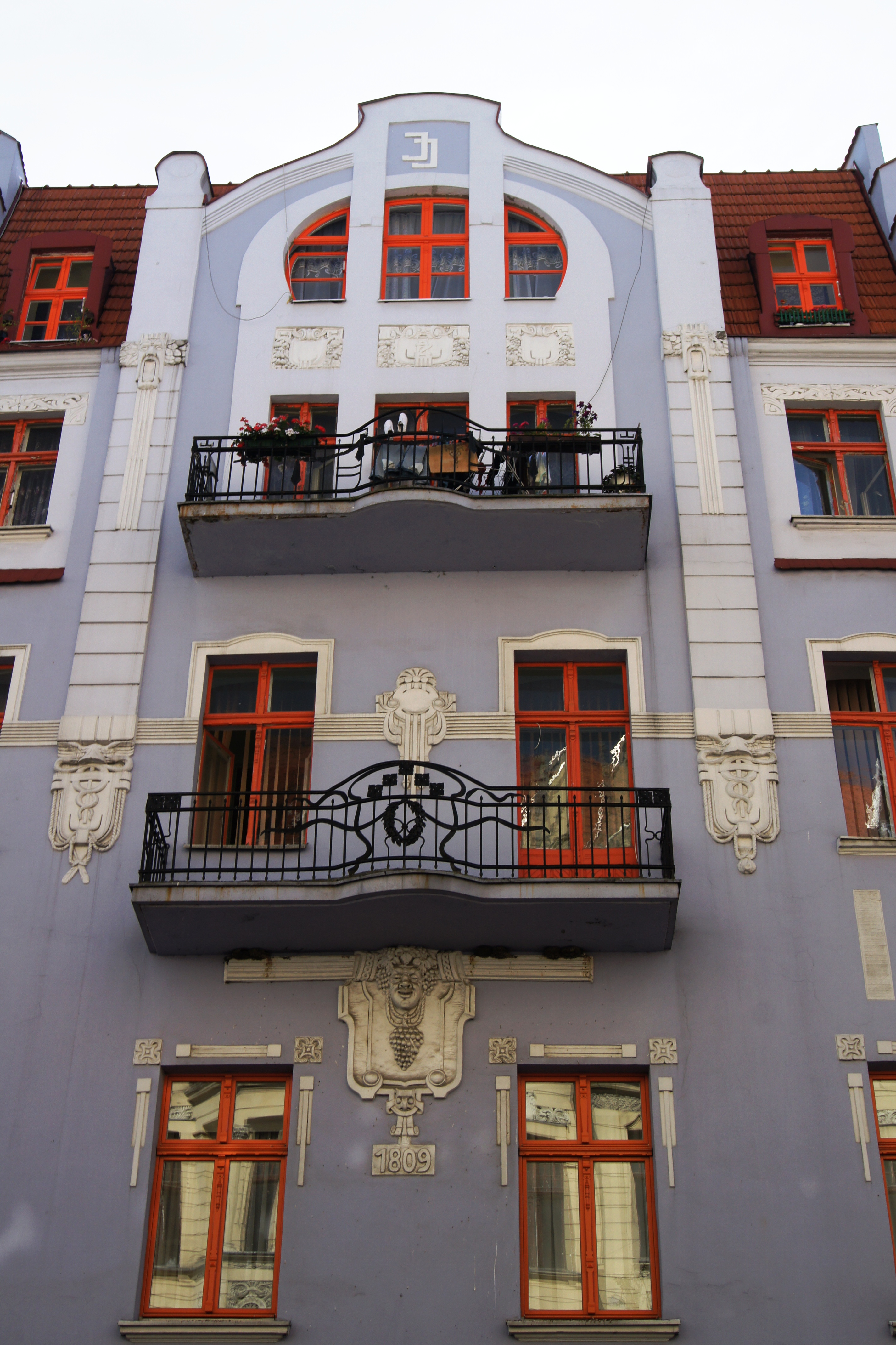 Toruń, ul. Szeroka 25 - kamienica z oficyną, 1907-1910 (zabytek nr A/123)